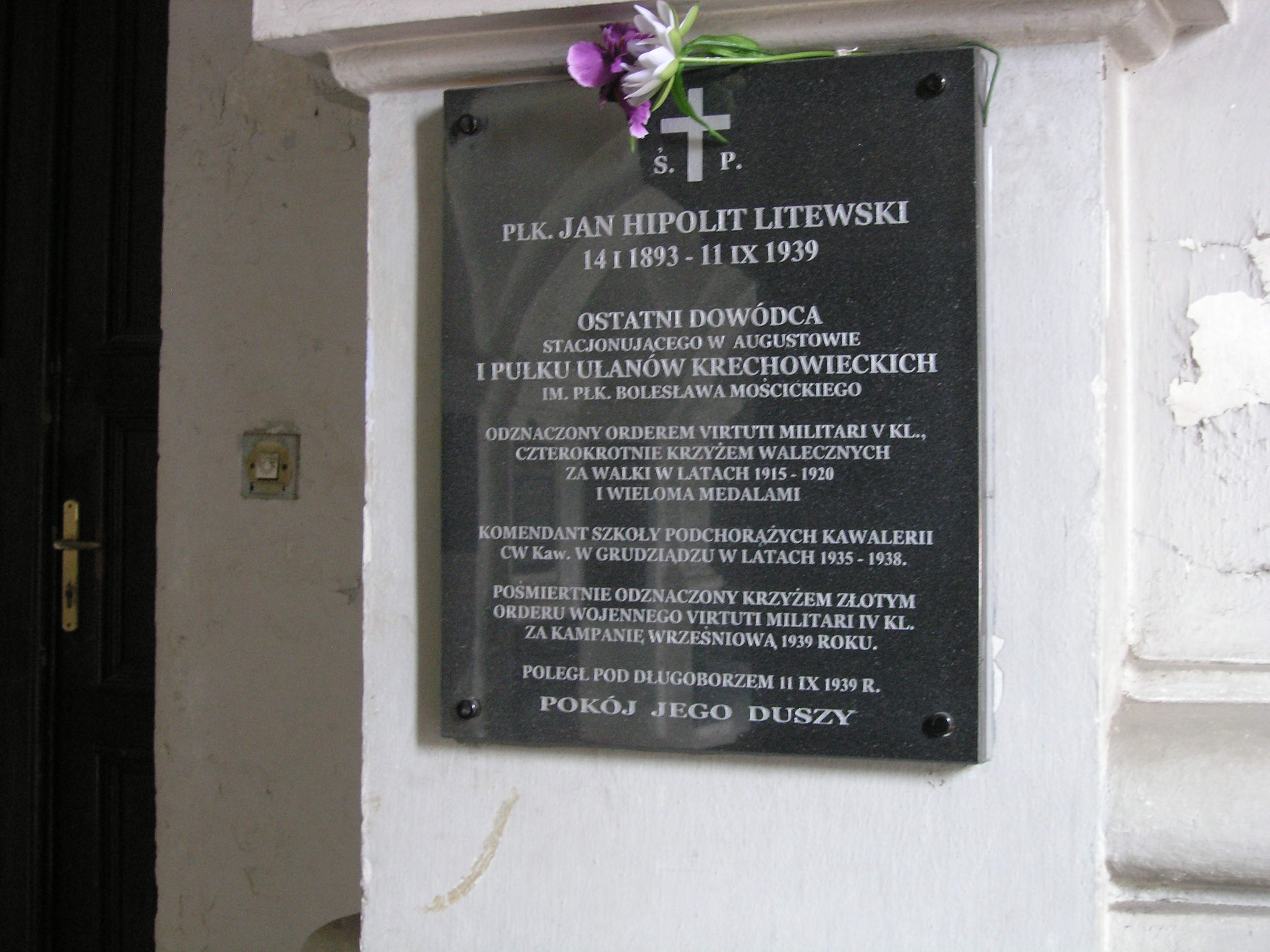 Tablica upamiętniająca Jana Hipolita Litewskiego w krużganku Kościoła św. Antoniego Padewskiego w warszawskim Śródmieściu Północnym przy ulicy Senatorskiej 31/33.